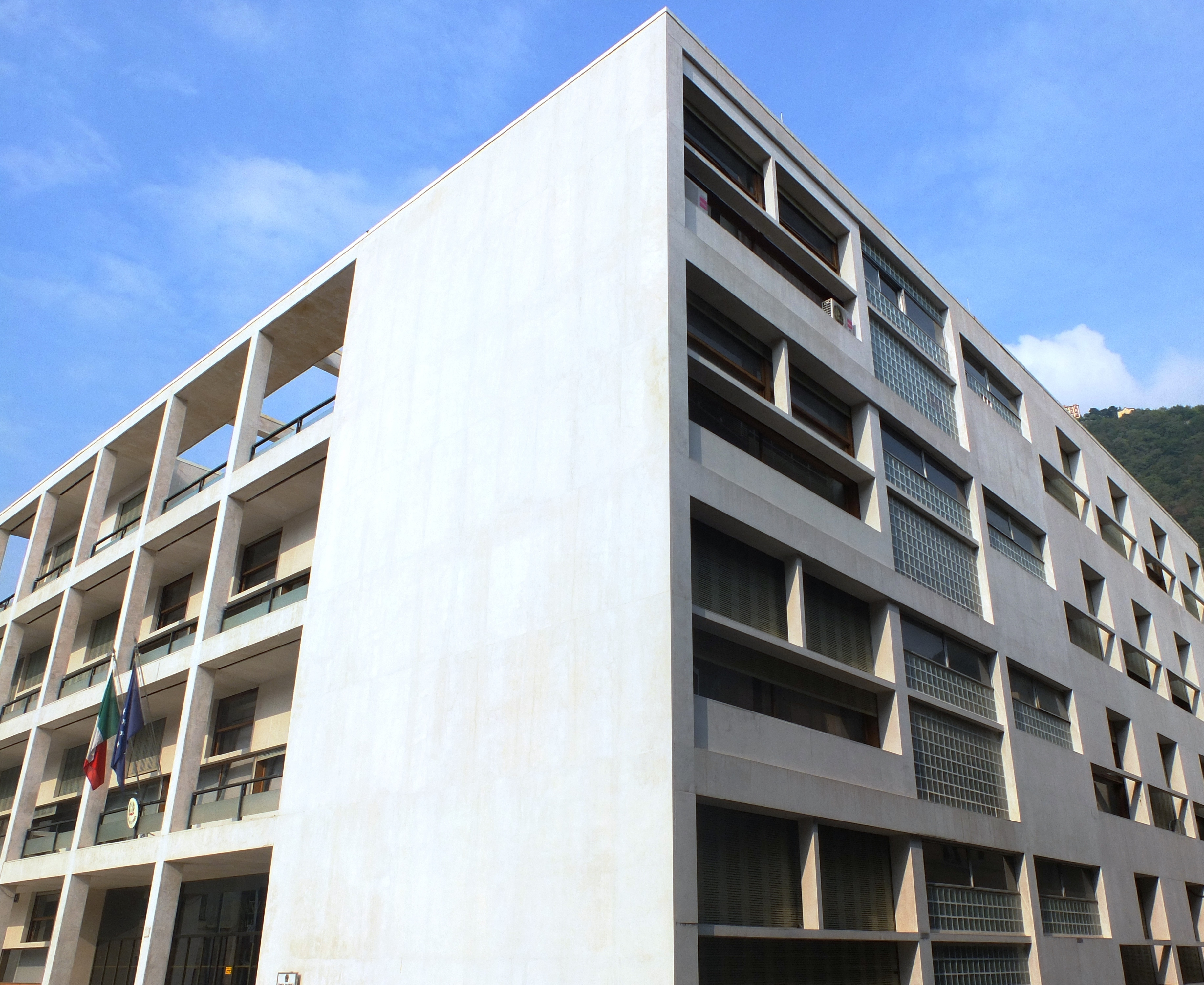 prospettiva inusuale della Casa del Fascio di Como This is a photo of a monument which is part of cultural heritage of Italy.